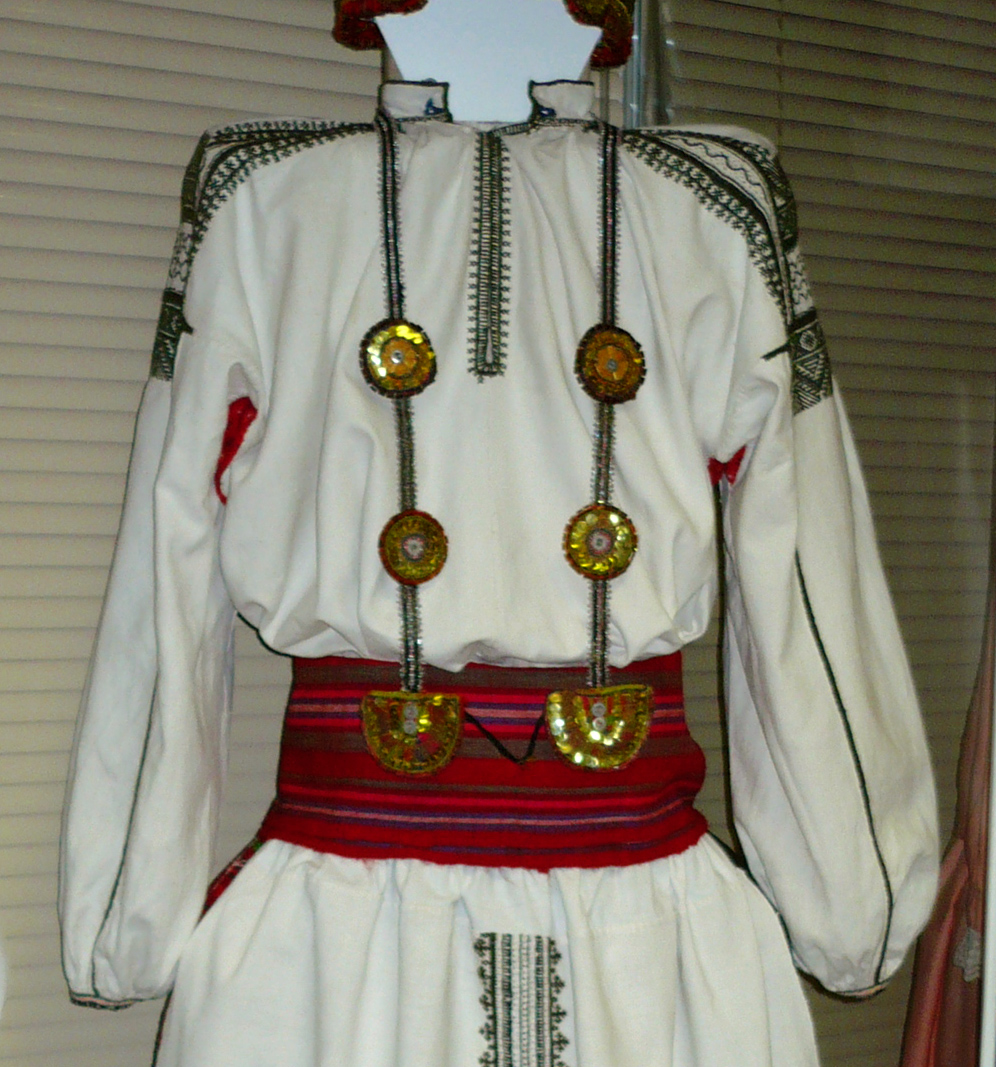 Грибатка. Женский парадный костюм села Верхняя Покровка Красногвардейского района Белгородской области (бывший Бюрючинский уезд Воронежской губернии). Конец XIX — начало XX века. Стенд В. Русский музей (Пед. колледж). Белгородская область, 2008.